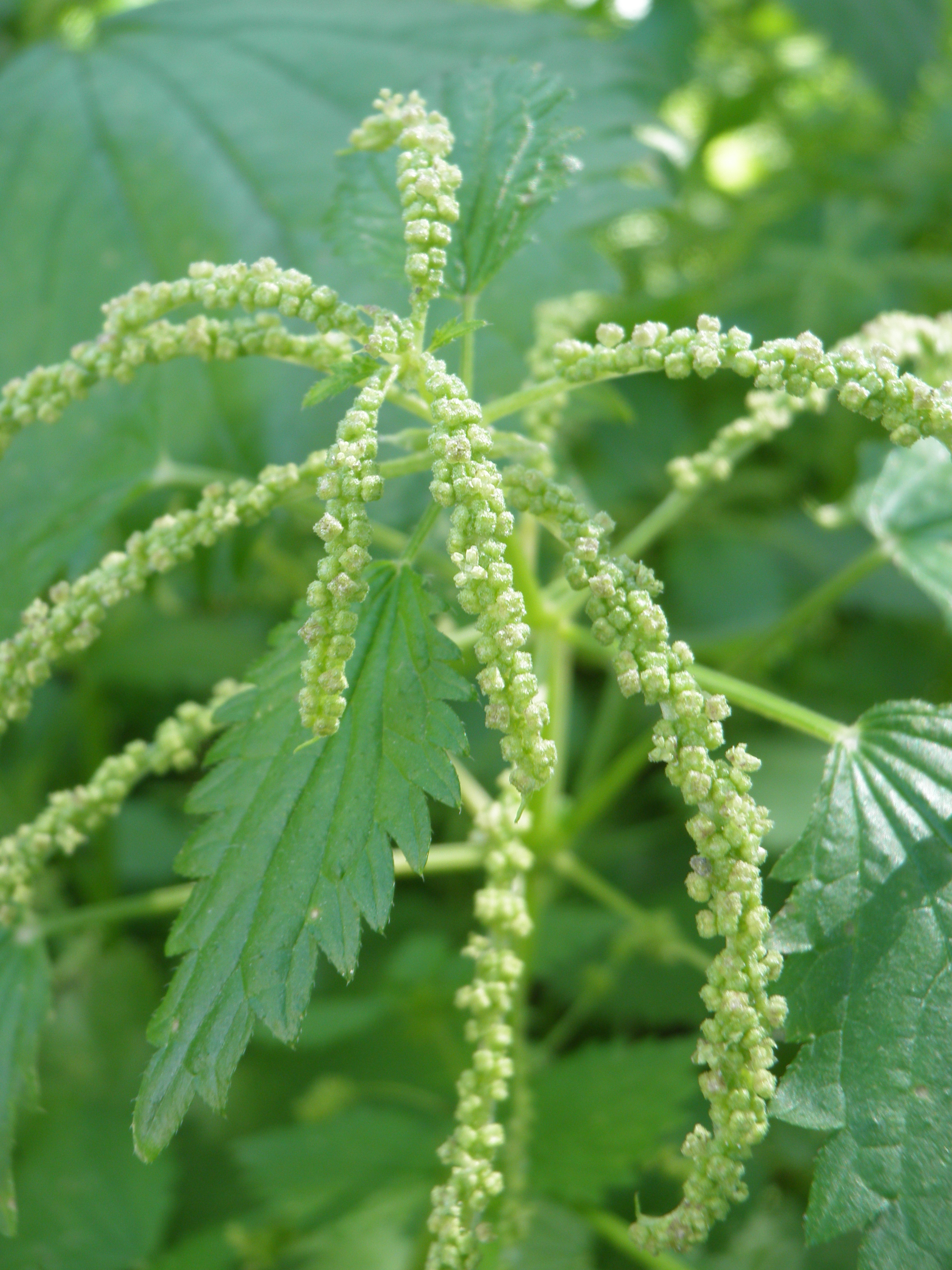 סרפד קרומי